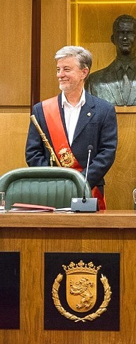 Pedro Santisteve con la banda y el bastón municipal como Alcalde de Zaragoza.